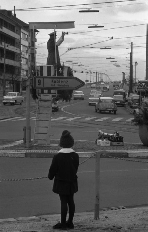 Weihnachtsgeschenke der Bonner Kraftfahrer für den Verkehrsposten am Bertha-von-Suttner-Platz Bonn